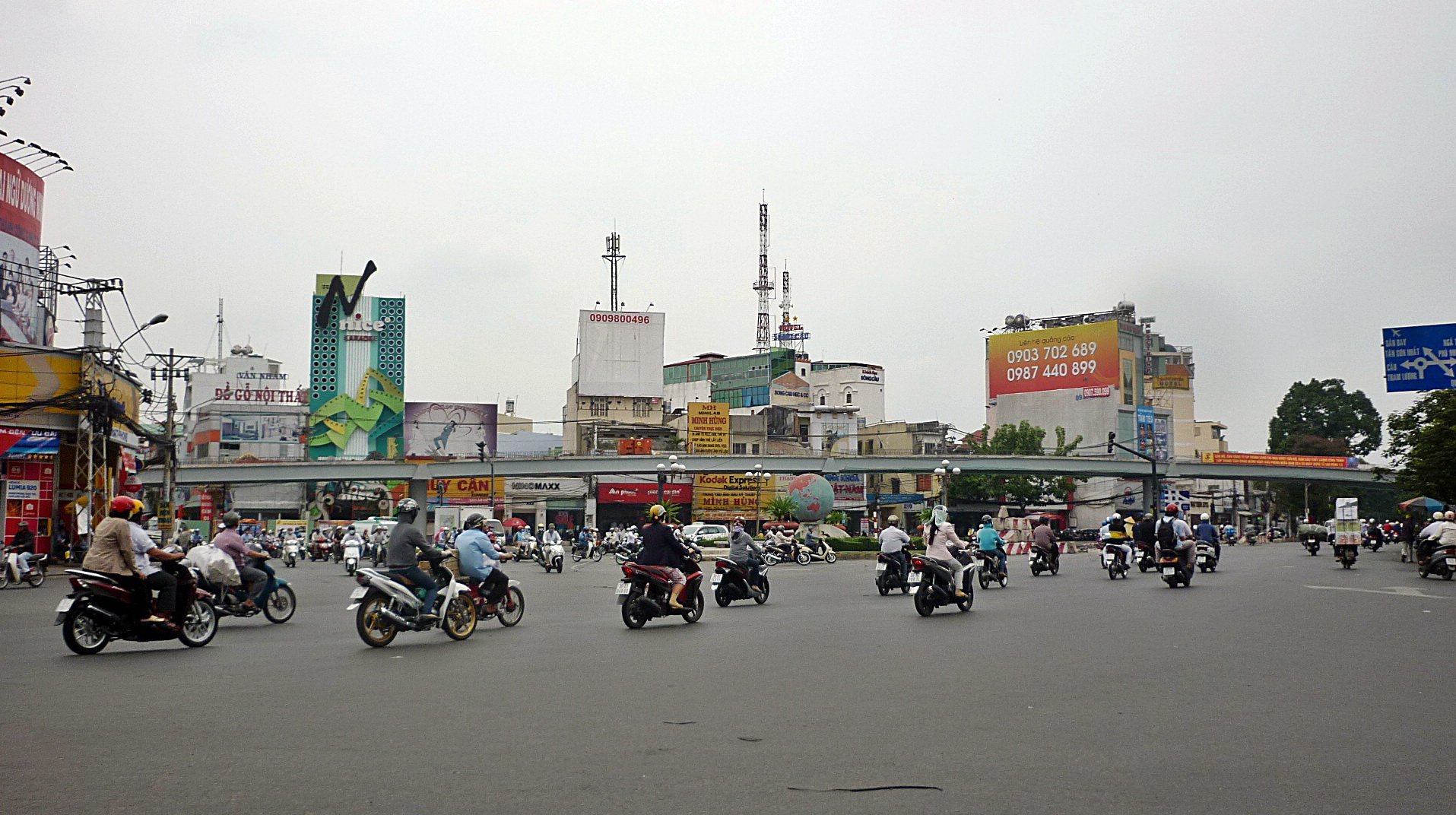 Cầu vượt thép Lăng Cha Cả đang trong quá trình xây dựng sau khi hợp long. Lăng Cha Cả overpass bridge is under-construction.